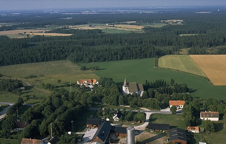 Sjonhems kyrka i bildens mitt. Motiv: Sjonhem Nyckelord: Flygbilder, Riksintressen Kategori: Kyrkby Sjonhems kyrka i bildens mitt. Länsväg 143 går förbi sydväst om kyrkan.